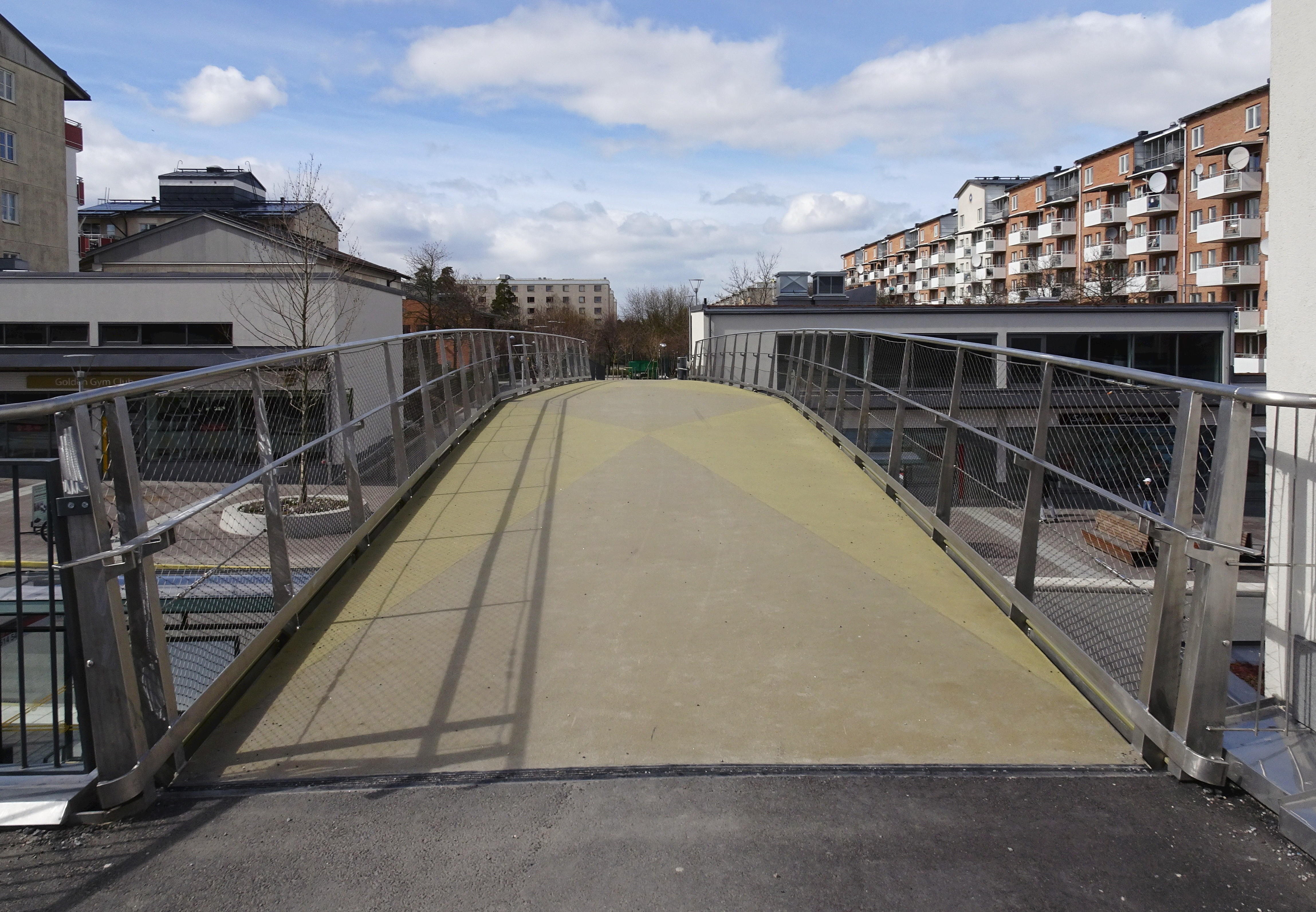 Rinkebystråkets bro, arkitekt &Rundquist